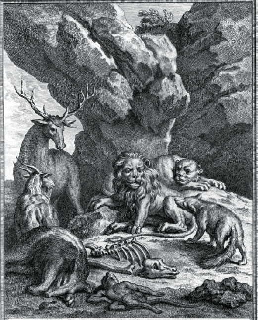 La Cour du lion (La Fontaine VII, 6) Illustration d'un ouvrage de 1756 (Google Books)